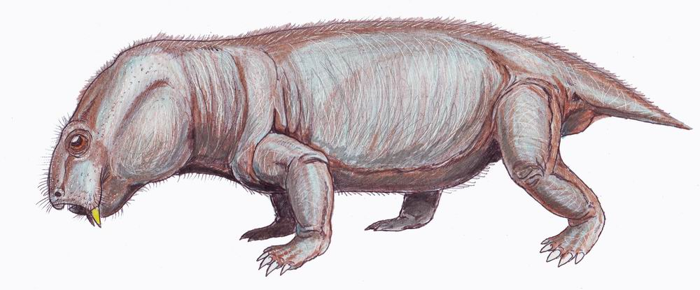 Kingoria